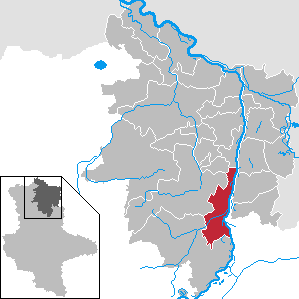 Tangermünde im Landkreis Stendal, Sachsen-Anhalt